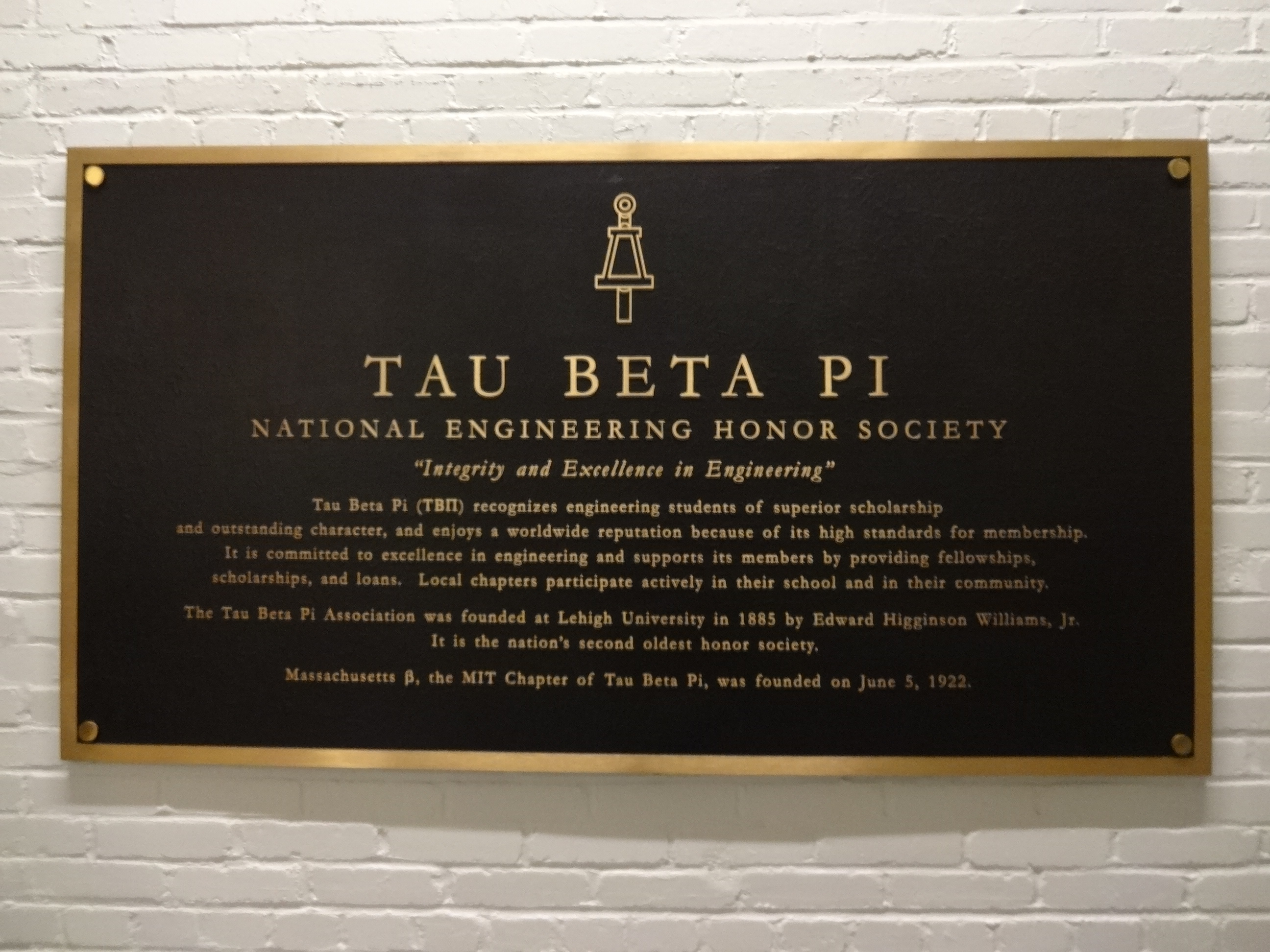 Placa do Tau Beta Pi em uma parede do Massachusetts Institute of Technology, em Massachusetts, Estados Unidos.